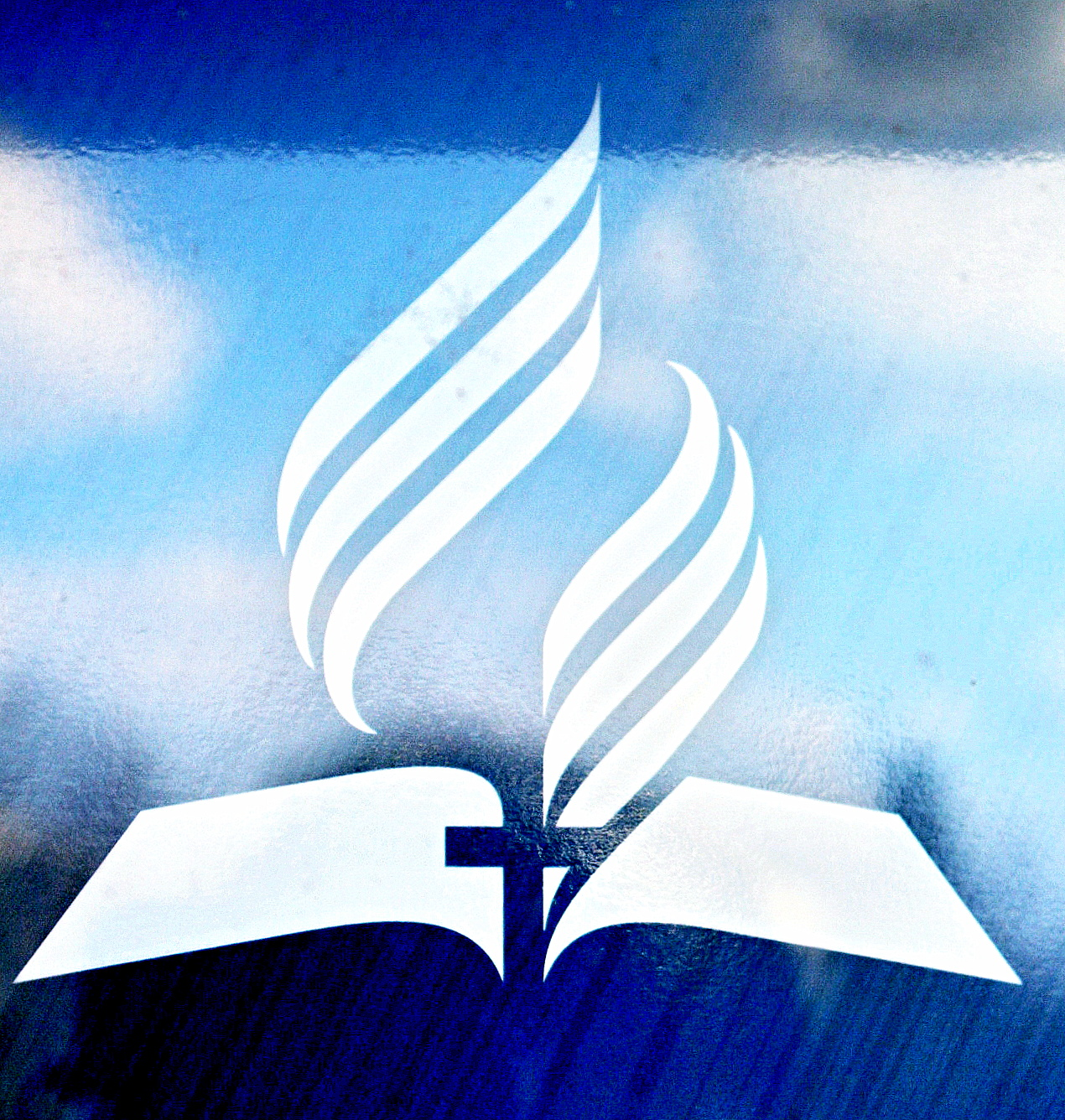 Modlitebna Církve ASD